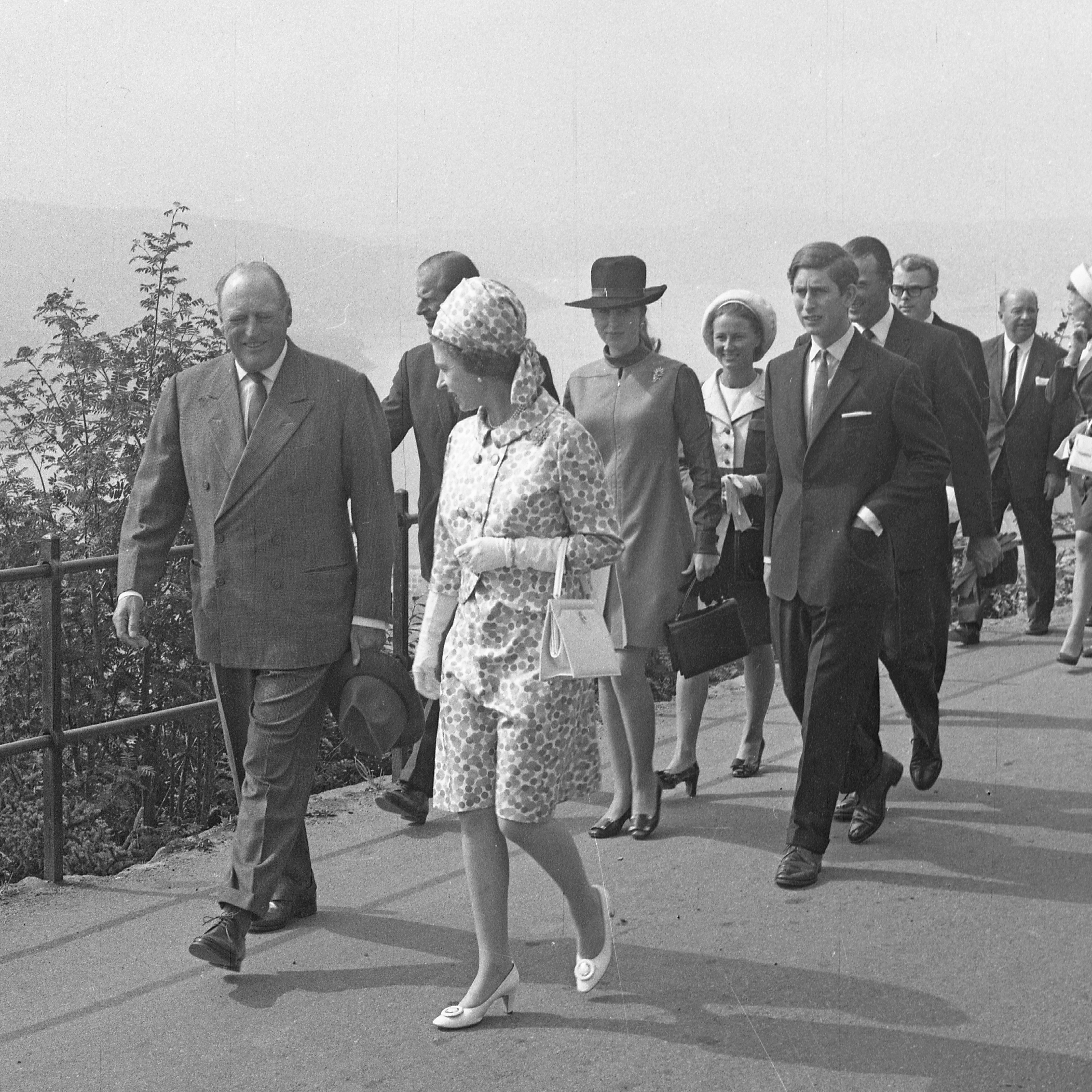 Format: 120 mm sort/hvitt negativ [utsnitt] Dato / Date: 7 August 1969 Fotograf / Photographer: Eirik Sundvor (1902 - 1992) Sted / Place: Bergen, Hordaland Wikipedia: Elizabeth II Wikipedia: Olav V Eier / Owner Institution: Trondheim byarkiv, The Municipal Archives of Trondheim Arkivreferanse / Archive reference: Tor.H43.B79.F18335 Merknad: Fra den britiske kongefamiliens besøk i Bergen 1969. Kong Olav V leder an sammen med dronning Elizabeth II. I neste rekke prins Philip, prinsesse Anne og prins Charles. I tredje rekke kronprinsesse Sonja og kronprins Harald.